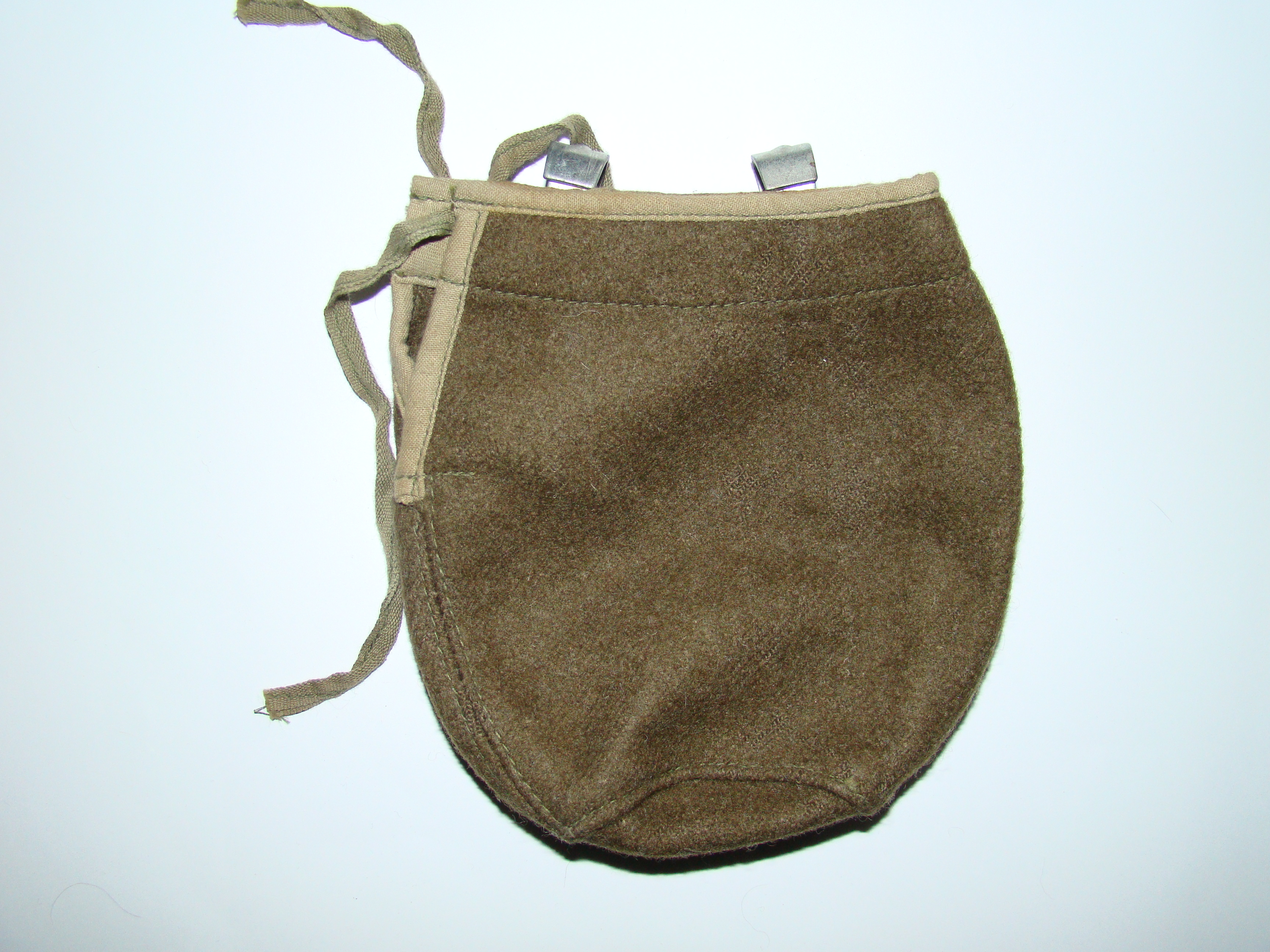 Pokrowiec LWP na manierkę wz. 37